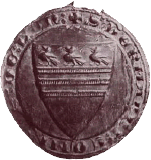 Seal of Lohn between 1138 and 1139